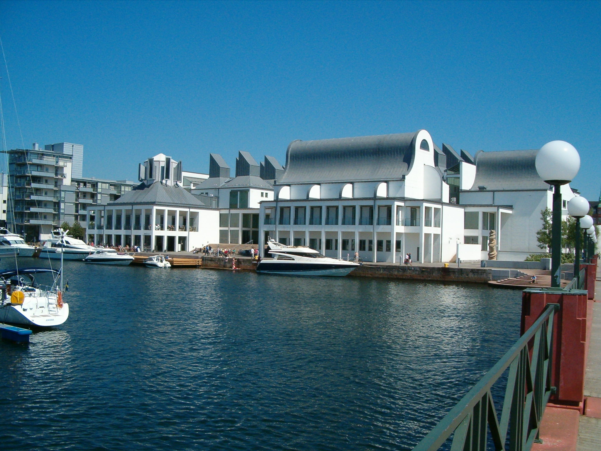 Henry Dunker Culture Centre in Helsingborg, Sweden.